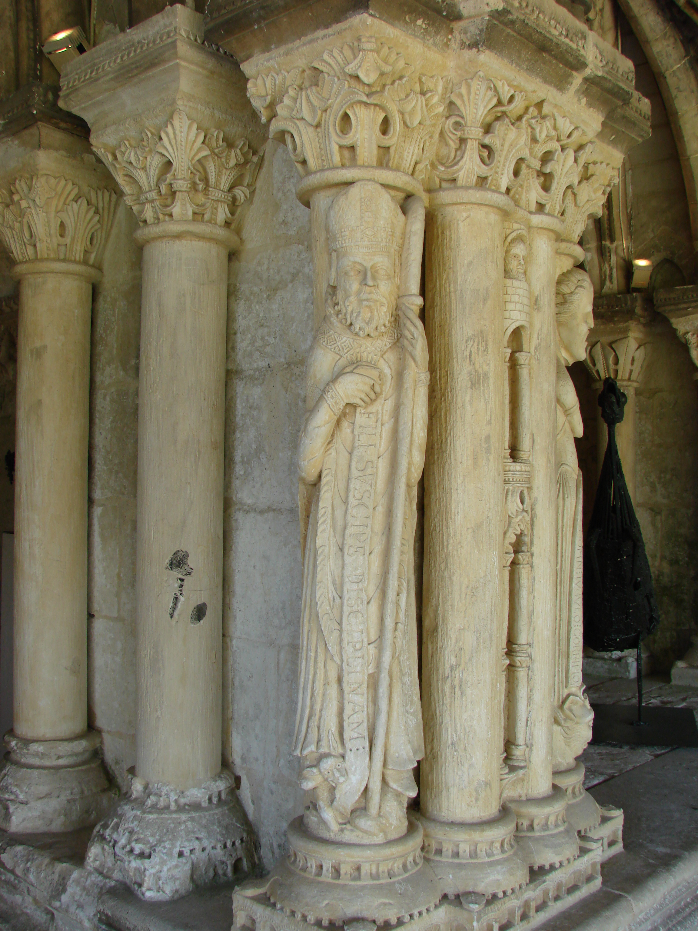 Abbaye Saint-Georges de Boscherville, Normandie